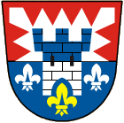 Znak obce Branky, okres Vsetín. V červeno-modře děleném štítě modro-stříbrně dělená kvádrová věž s cumbuřím, dvěma černými okny a prázdnou branou. V horním poli věž položena na polovinu stříbrného kopřivového listu, dole provázena třemi liliemi, stříbrnými po stranách a zlatou dole.